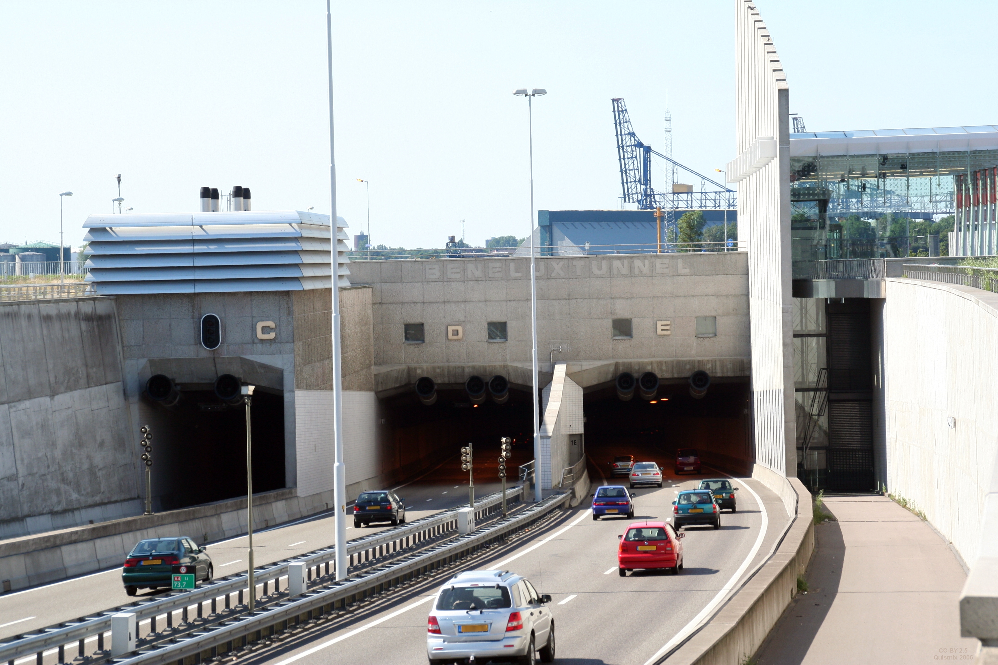 Beneluxtunnel, gezien vanaf de zuidkant. Het gedeelte op de foto is het "nieuwe" tunneldeel met daarin de buizen C t/m E. Rechts in beeld is de in- en uitgang van de fietstunnel. Eigen foto. Beneluxtunnel, Rotterdam, seen from the south Categorie:Afbeelding Rotterdam